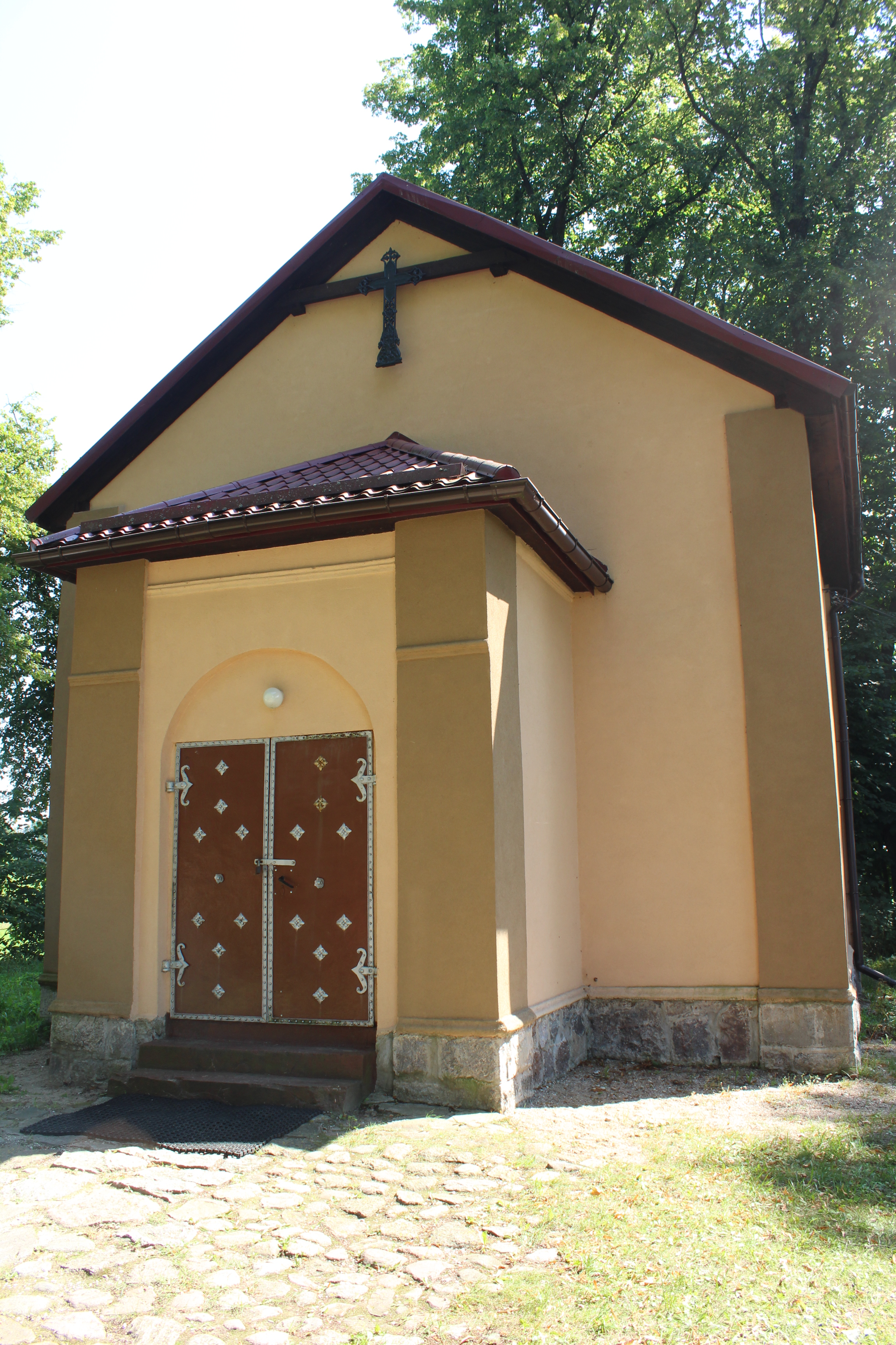 Kaplica Dobrego Pasterza w Możdżanach